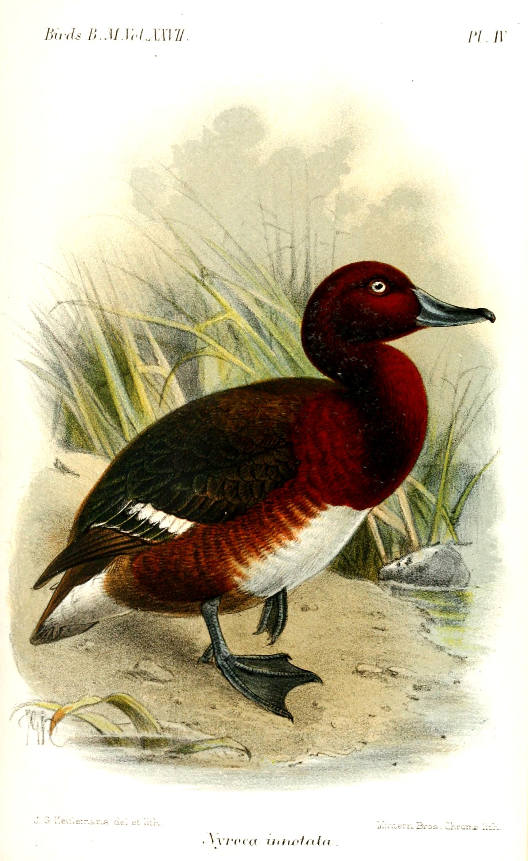 Nyroca innotata = Aythya innotata, Madagascar Pochard